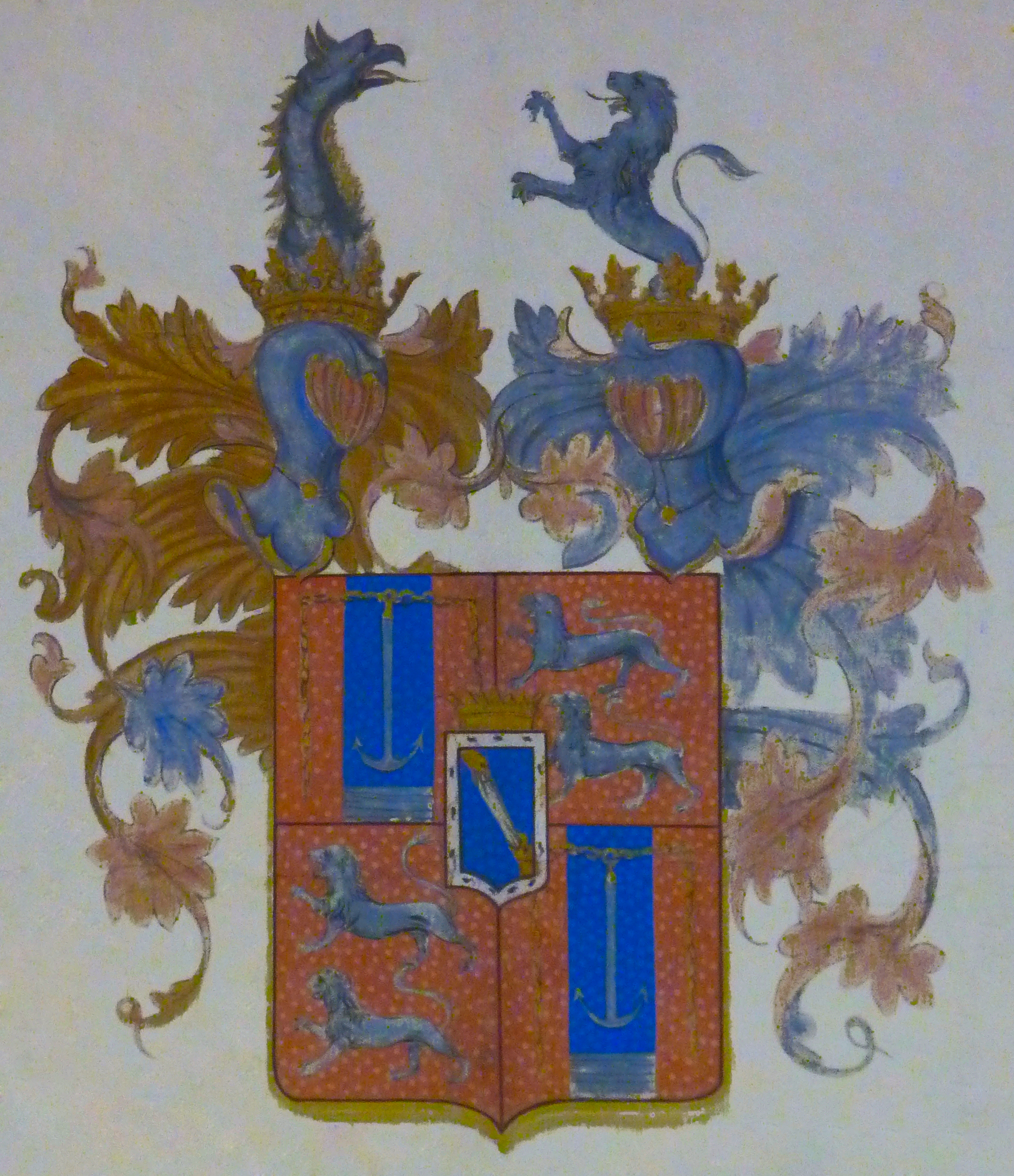 Wappen (Hoyos) an Langhausdecke, Pfarrkirche, St. Leonhard am Hornerwald, Niederösterreich